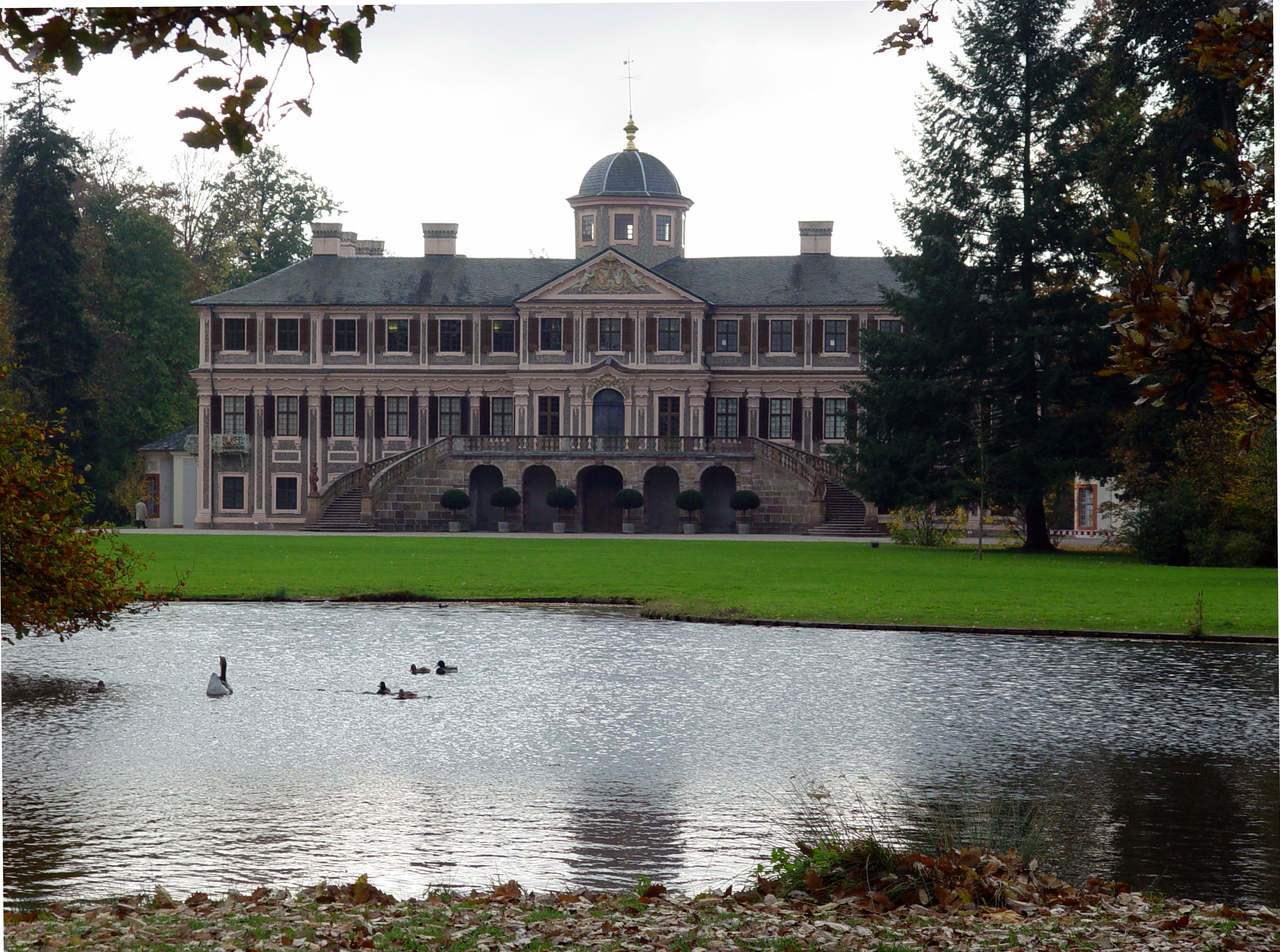 Fotografiert von Martin Dürrschnabel. Schloss Favorite in Rastatt.